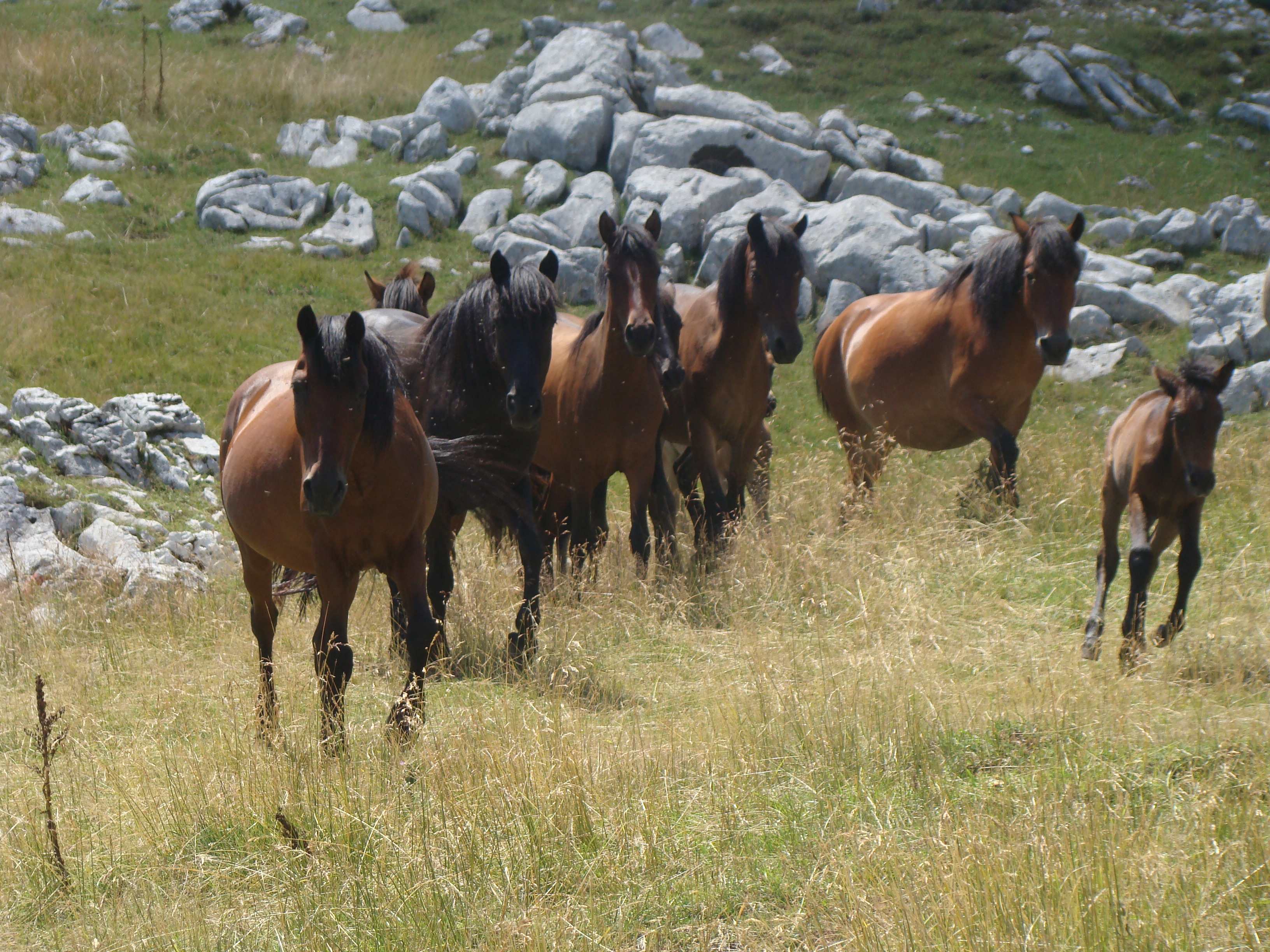 Zelengora, NP Sutjeska 2016